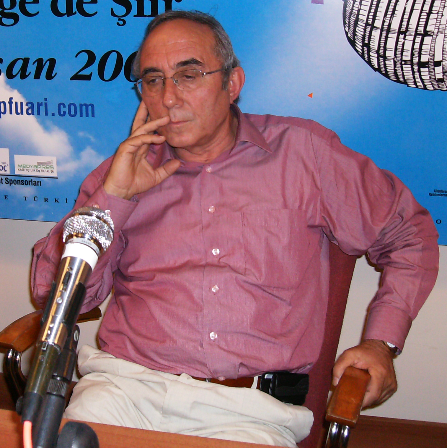 kendi çekimim. 13. izmir kitap fuarı